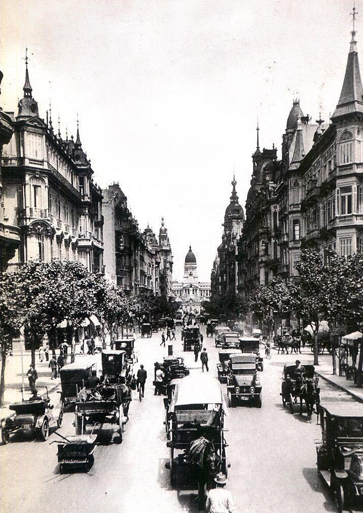 Vista de la Avenida de Mayo desde la esquina de la calle Lima mirando hacia el oeste, rematando en la cúpula del Palacio del Congreso de la Nación, inaugurado en 1906. Se destacan los vehículos de la época, algunos aún tirados por caballos, y la ausencia de algunos edificios relevantes que aún no estaban construidos, como el Hotel Castelar (1928) o el Palacio Barolo (1923). Sin embargo se ven a la izquierda las cúpulas del Edificio La Inmobiliaria (1910) y a la derecha las del Hotel Paris (1906) y Hotel Majestic (1909).